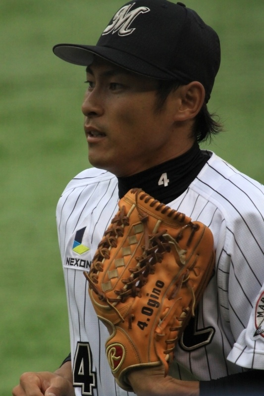 日本プロ野球 千葉ロッテマリーンズ 荻野貴司 外野手